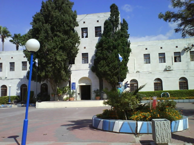 הבניין ההיסטורי כיום